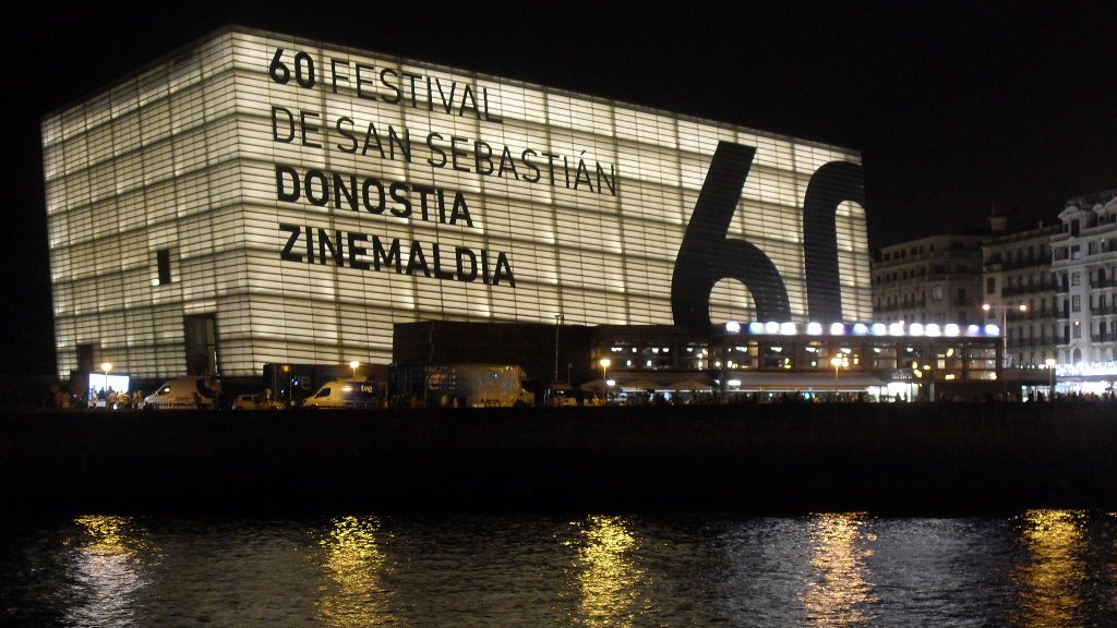 El Kursaal durante la 60 edición del Festival de cine de San Sebastián